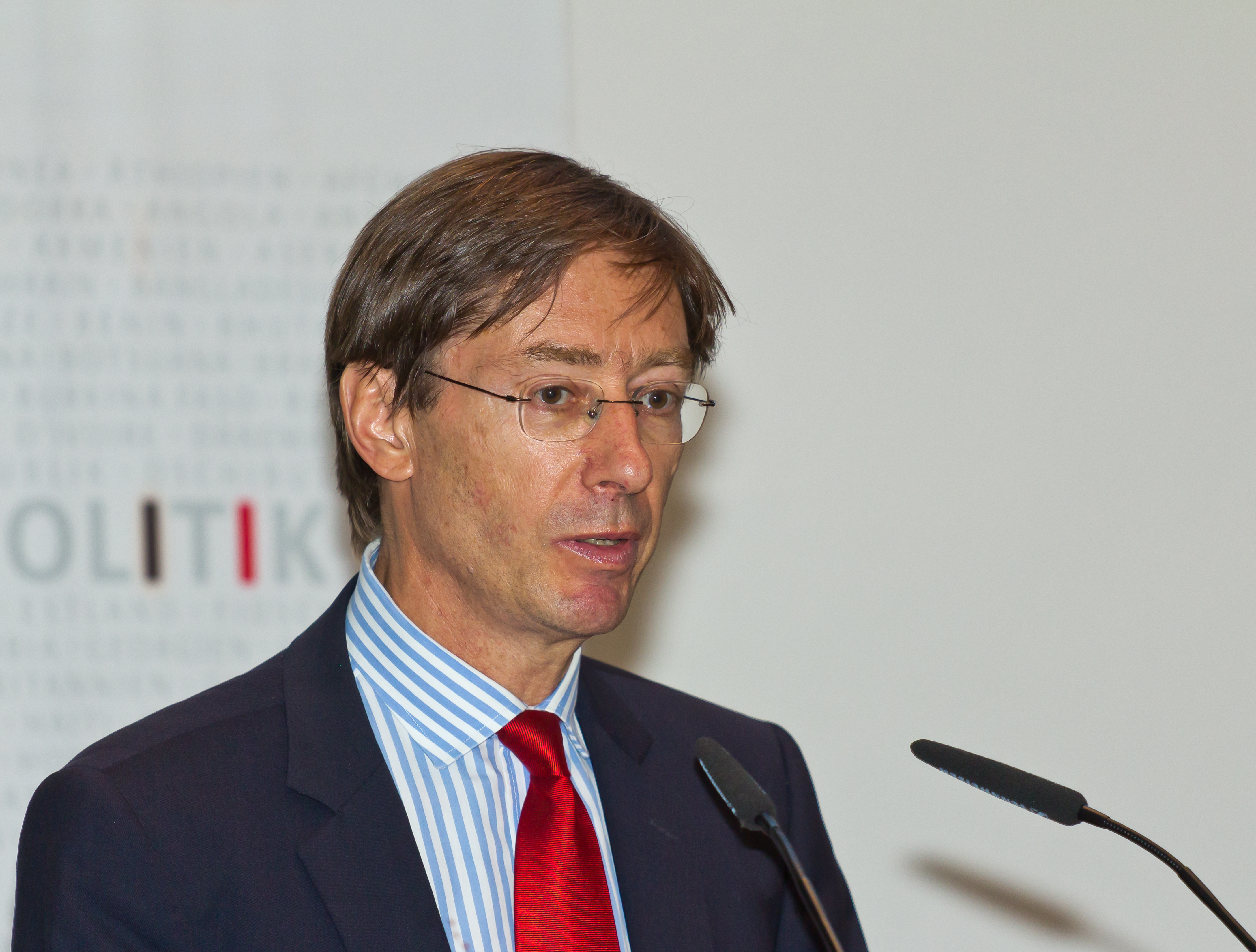 Diskussionsveranstaltung „Deutschlands Rolle in den Vereinten Nationen - eine Bilanz“ im Kölner Rathaus Foto: Rede von Peter Wittig, Ständiger Vertreter der Bundesrepublik Deutschland bei den Vereinten Nationen in New York City.